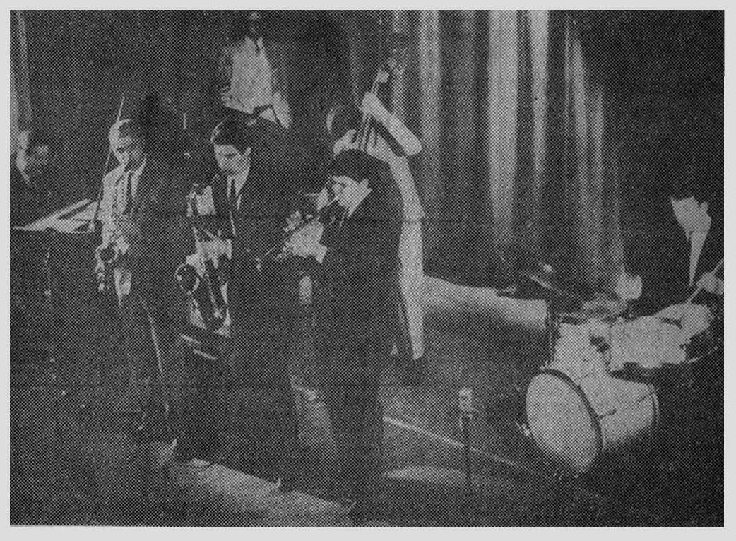 Foto del "Sexteto Mañosa" (Hot Club de Montevideo) tocando "Milestones" en el Teatro Florida, publicada en el diario "La Prensa" en Octubre de 1963. Buenos Aires , Argentina. Sexteto: Paco Mañosa, Bocho Pintos, Hector Bingert, Daniel "Bachicha " Lencina, Roberto "Pelin" Capobianco, Osvaldo Fattoruso.